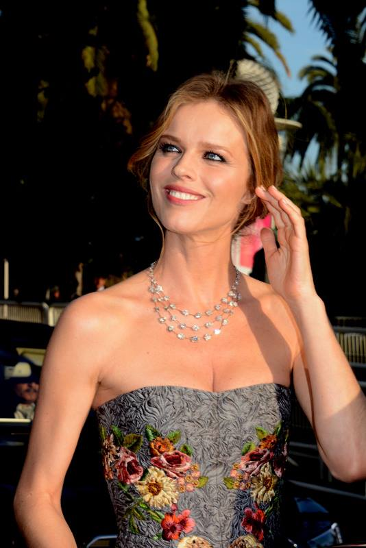 Eva Herzigova au festival de Cannes